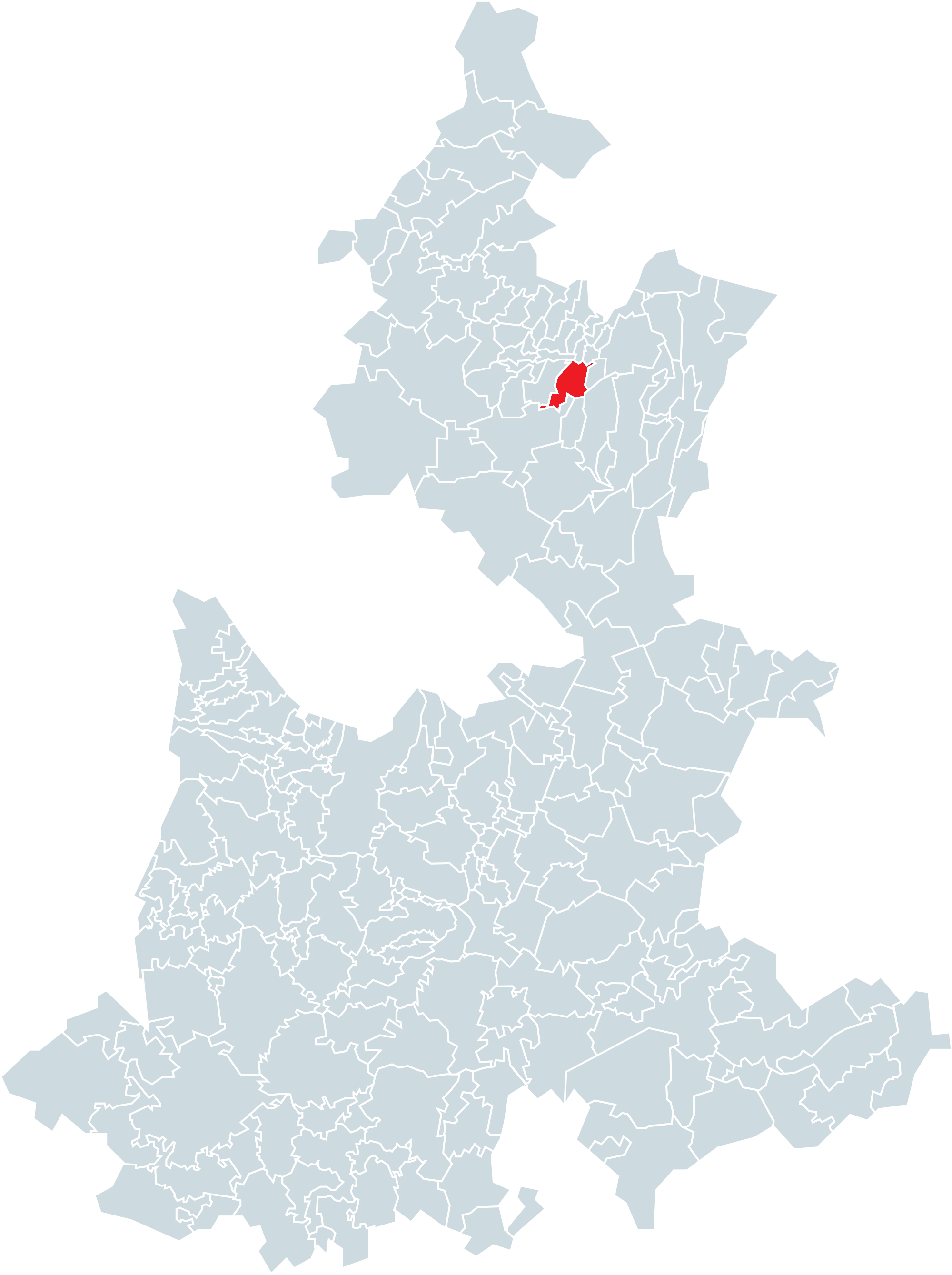 Municipio de Xochitlán de Vicente Suárez